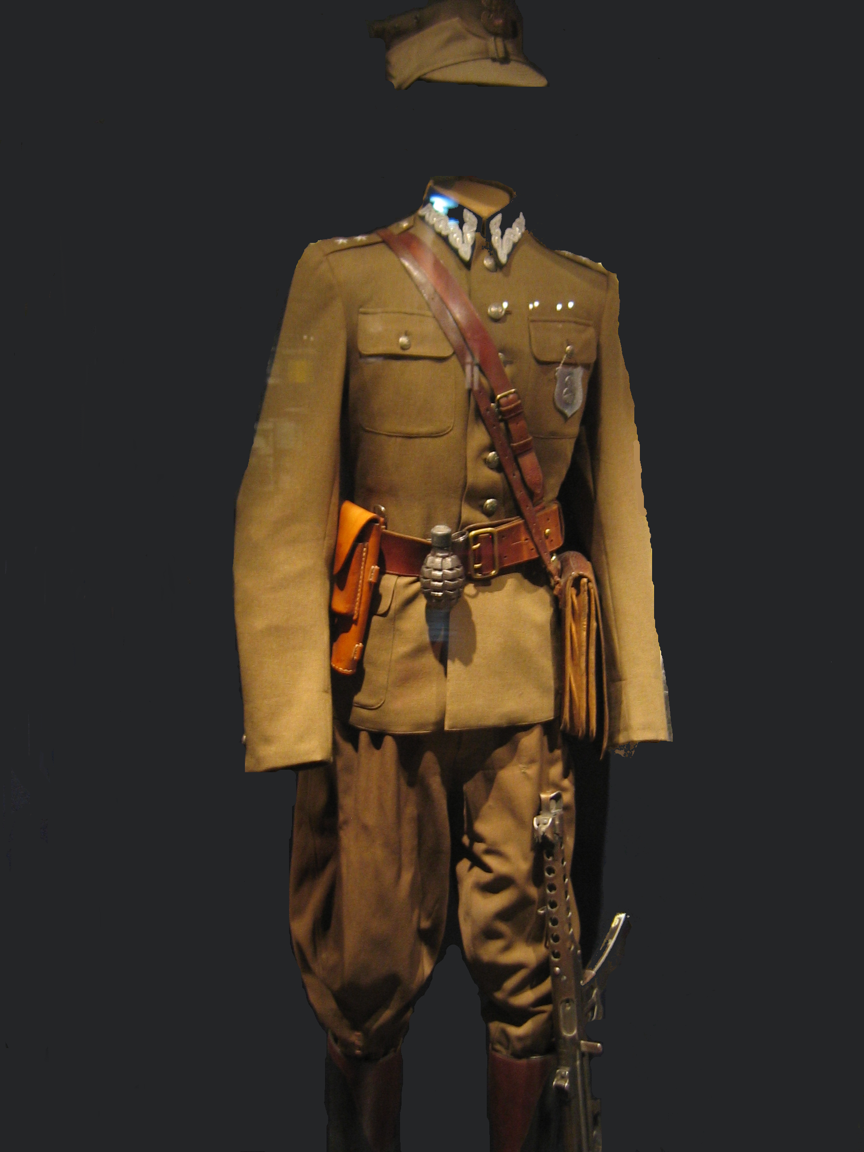 uniform of Polish anticommunust partisan lieutenant Edward Taraszkiewicz photo by User:Mathiasrex Maciej Szczepańczyk